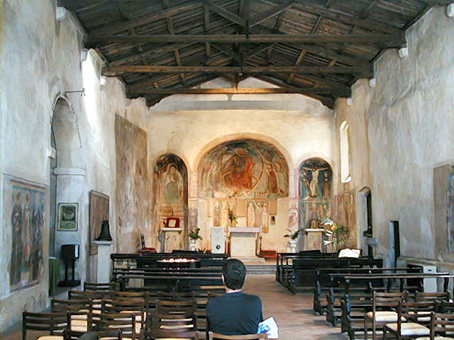 Sirmione, Innenaufnahme der Kirche San Pietro in Mavino